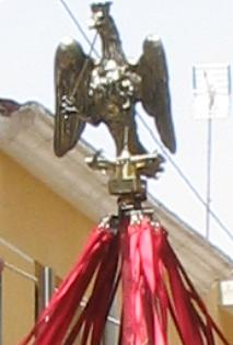 El Oriol, símbolo de Orihuela, sobre el estandarde de la ciudad de Orihuela.